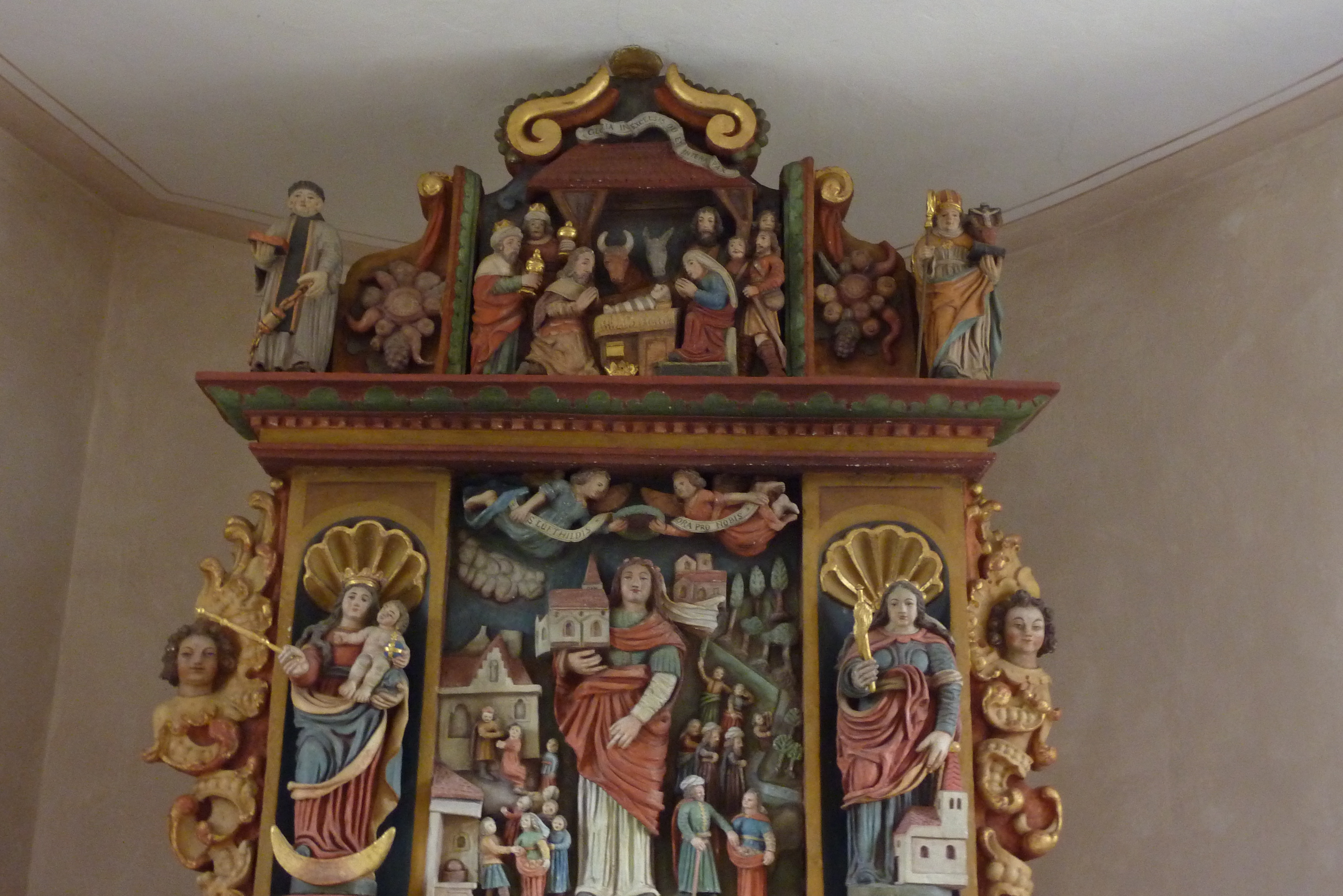 Kapelle St. Lüfthildis in Staffel, einem Ortsteil von Kesseling, oberer Teil des Altars